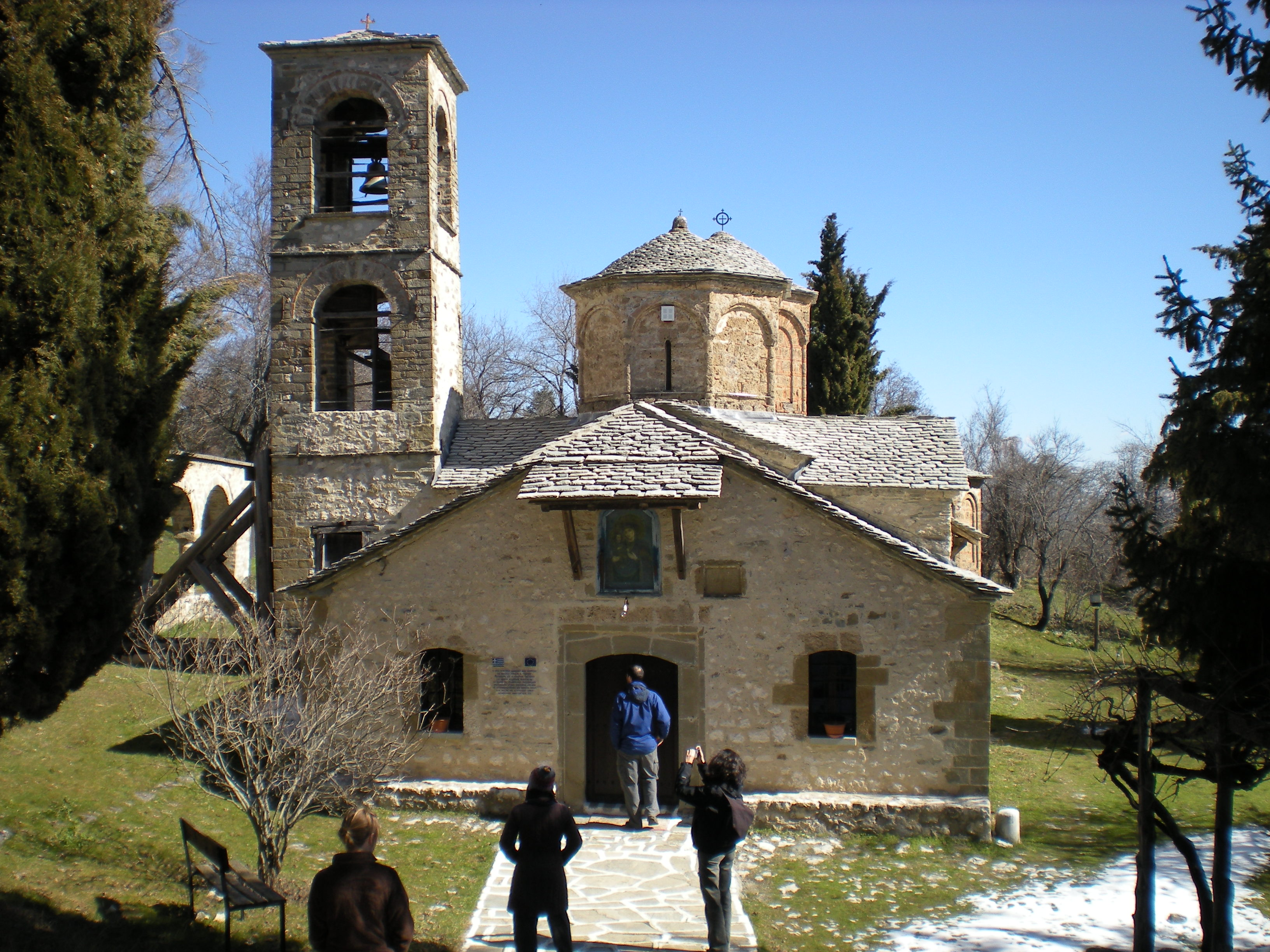 Църквата "Успение Богородично" в Спилео, Ном Гревена.